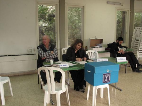 חברי ועדת קלפי בעבודה